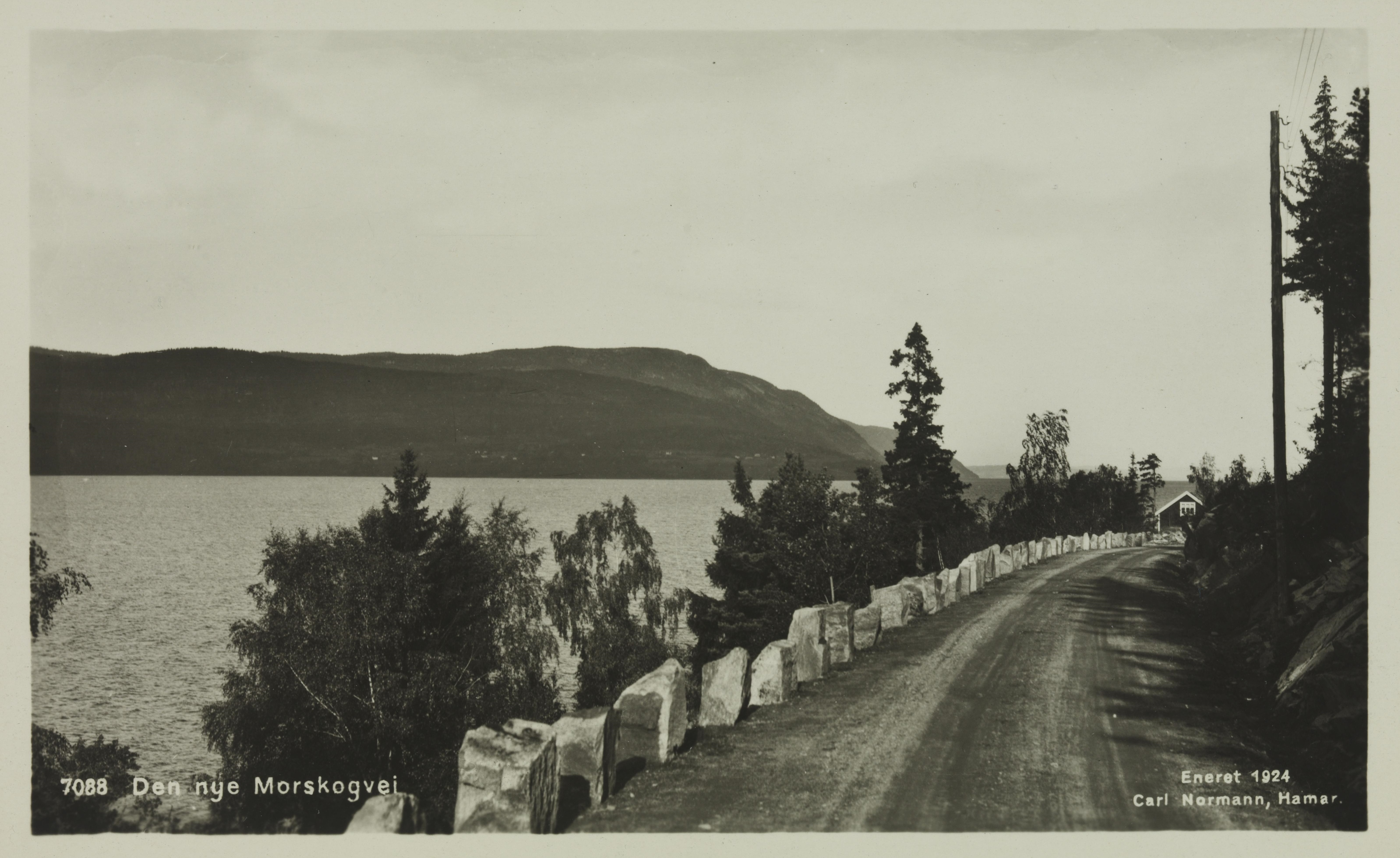 Bildet er hentet fra Nasjonalbibliotekets bildesamling Morskogen, Eidsvoll, Akershus, beskåret for penere visning